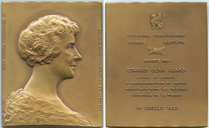 Plaquette en bronze représentant Anne Morgan fondatrice et présidente du C.A.R.D (Comité Américain pour les Régions Dévastées). Gravure de Marshall, 1927.